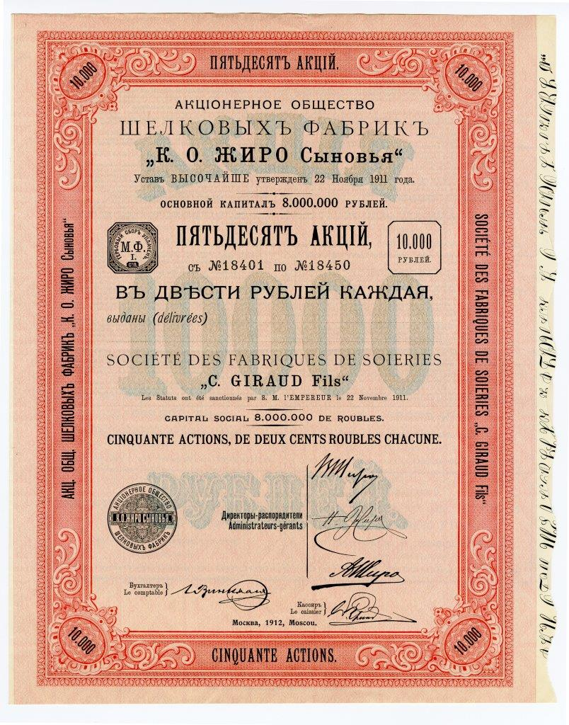 50 акций 200 руб. каждая Акционерного общества шелковых фабрик "К. О. Жиро сыновья"